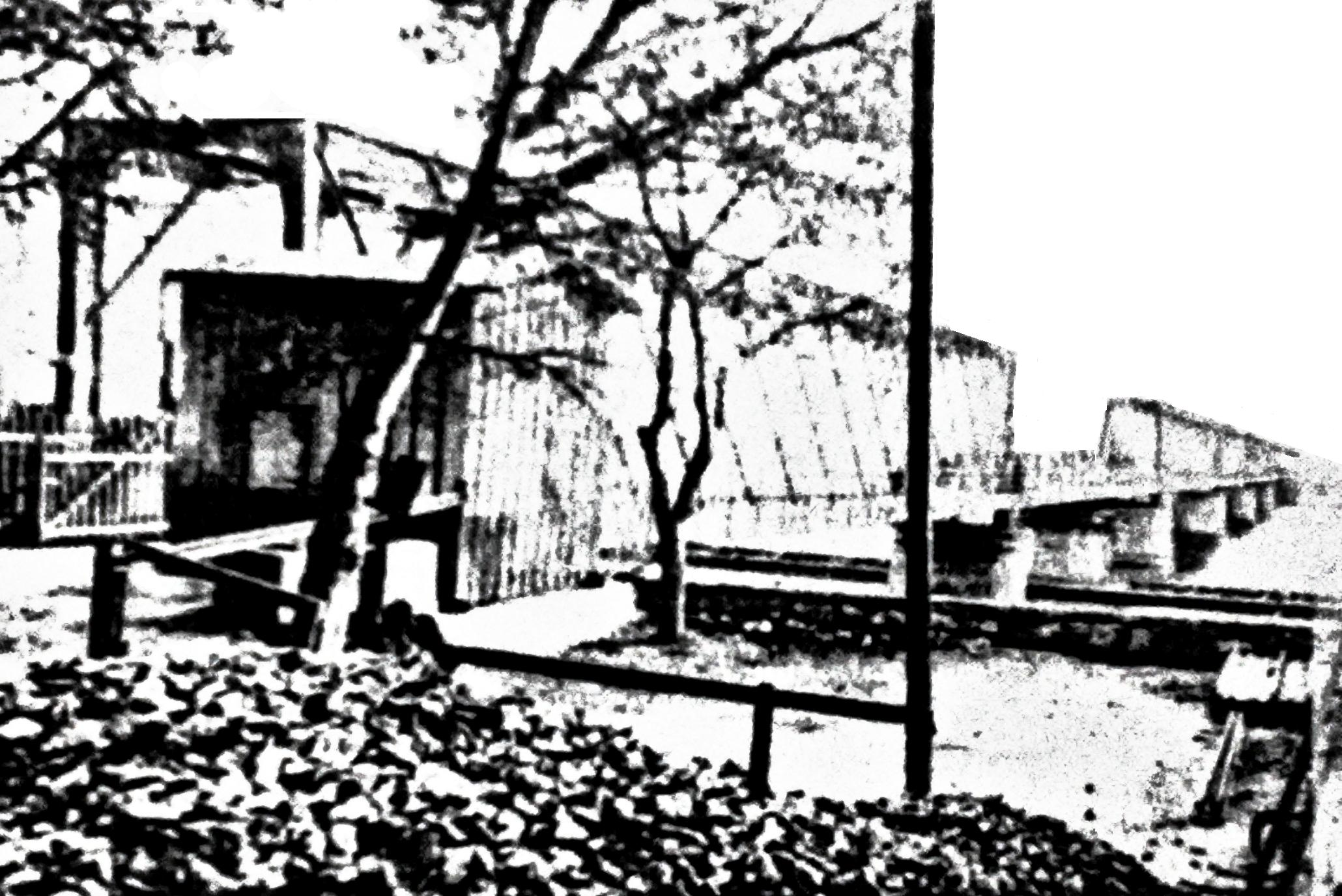 كوبري دسوق القديم عام 1897